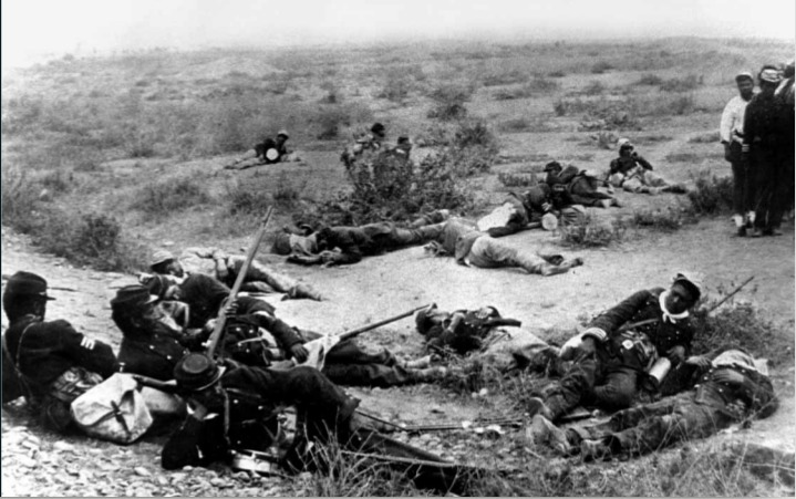 Muertos y heridos en el campo de Miraflores. La Batalla de Miraflores fue un enfrentamiento ocurrido el 15 de enero de 1881, entre la fuerzas del Ejército de Chile y el Ejército del Perú. En el marco de la Campaña de Lima, durante la Guerra del Pacífico. Soldados chilenos heridos descansan y esperan ayuda tras la batalla de Chorrillos (Sergio Villalobos, "Chile y Perú, la historia que nos une y nos separa 1535-1883", pág. 195